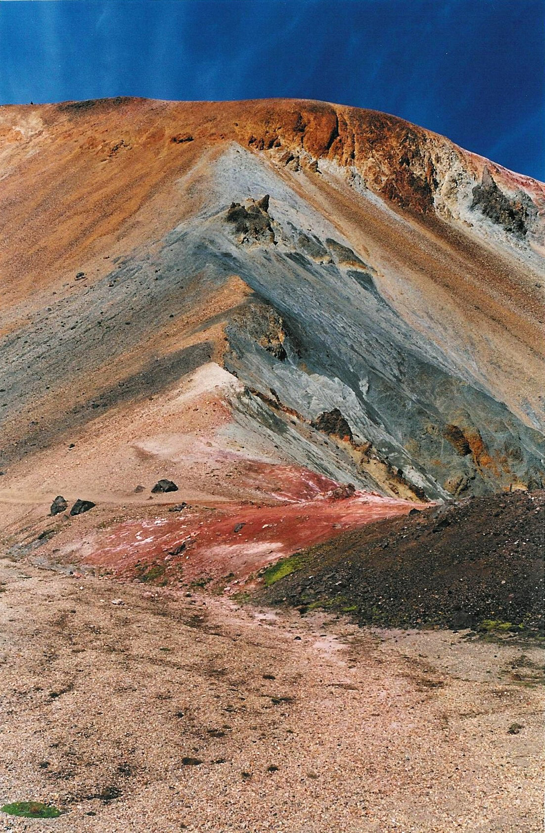 Le Brennisteinsalda, Islande. Ce spectaculaire volcan se trouve à proximité du Landmannalaugar. Il se situe sur le trek reliant Landmannalaugar à Þórsmörk, le Laugavegur.